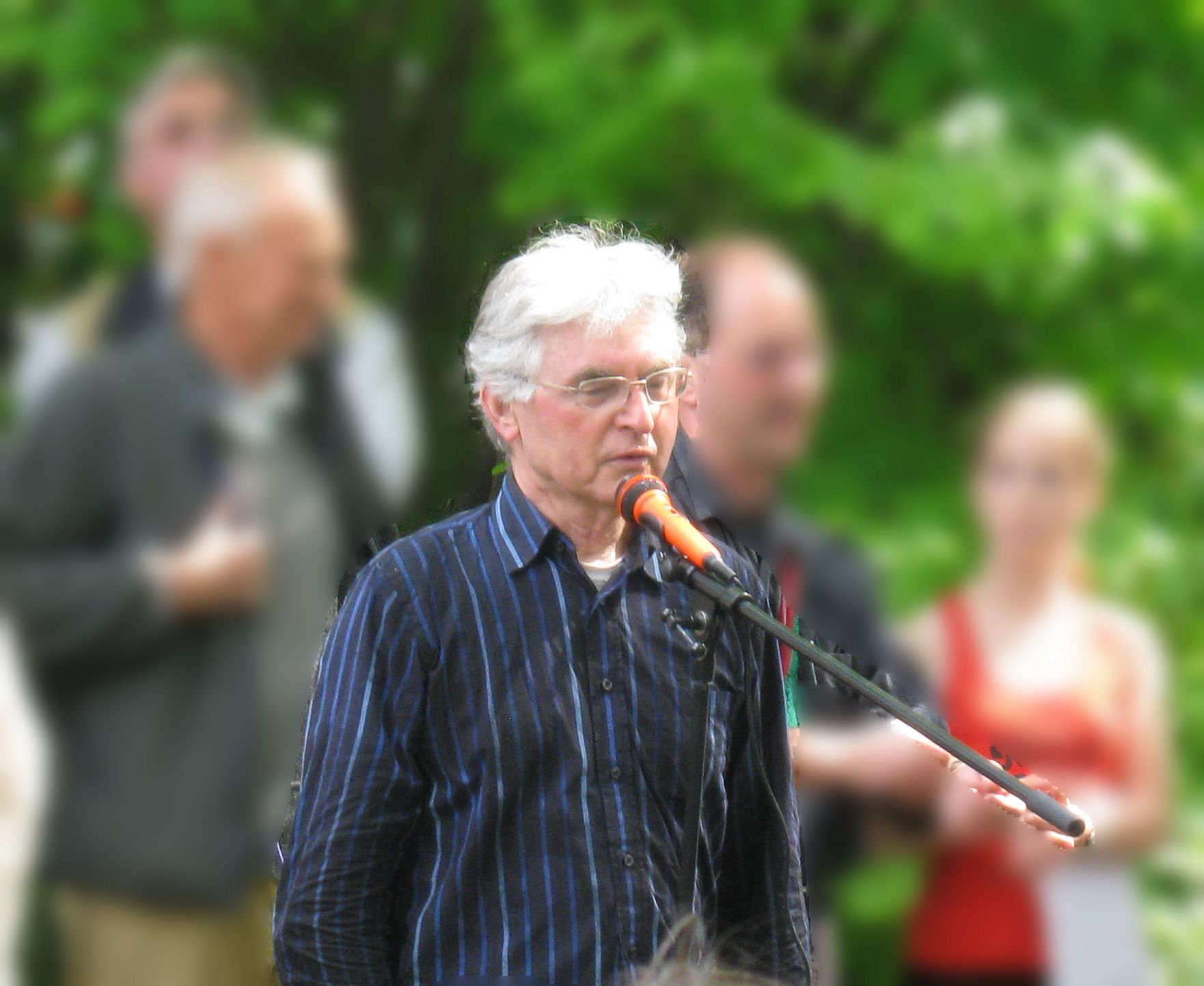 Der Journalist und ehemalige ARD-Korrespondent Friedrich Schreiber während einer jährlich von ihm organisierten Gedenkveranstaltung zur Erinnerung an den Todesmarsch von Dachau, welcher in den letzten Kriegstagen durch das Würmtal führte.